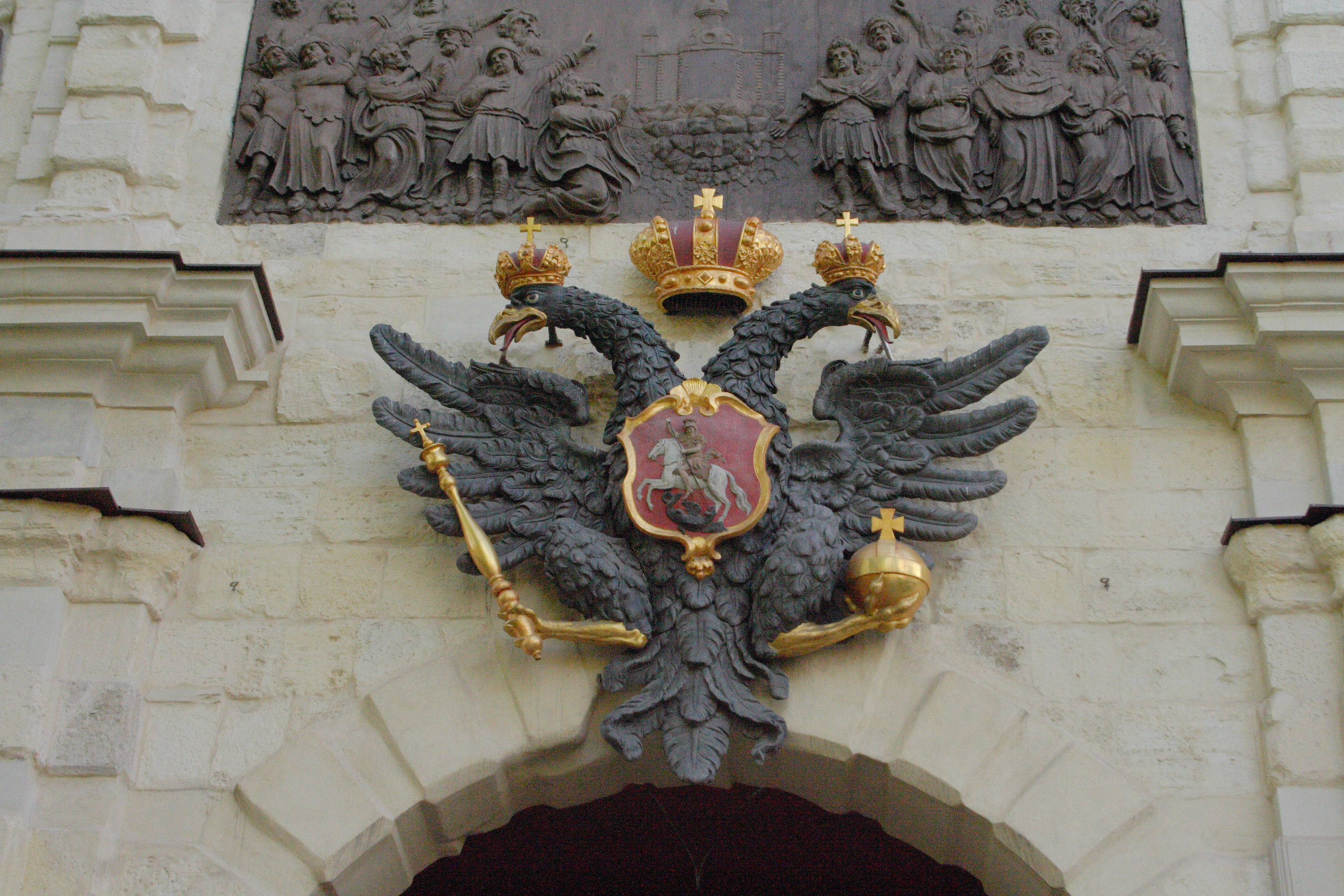 Петровские ворота Петропавловской крепости